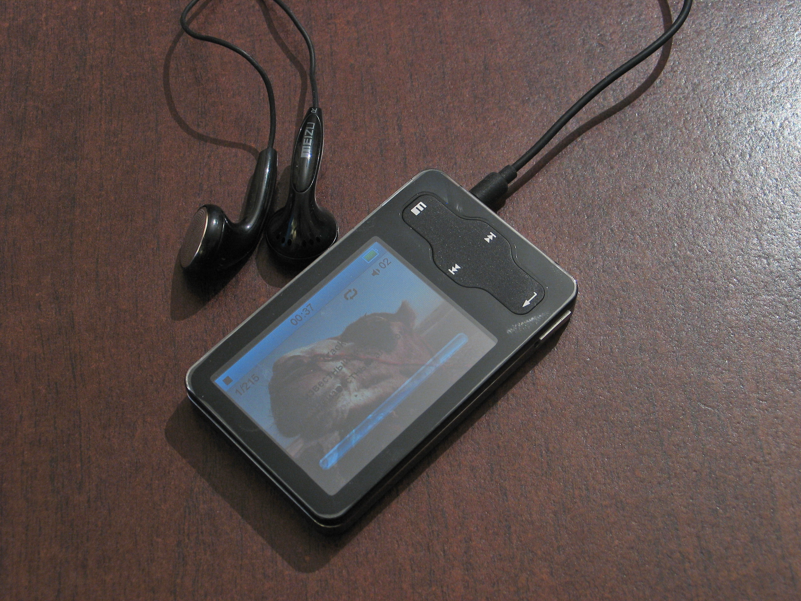 Популярный плеер компании Meizu, продававшийся в России под брендом Ritmix